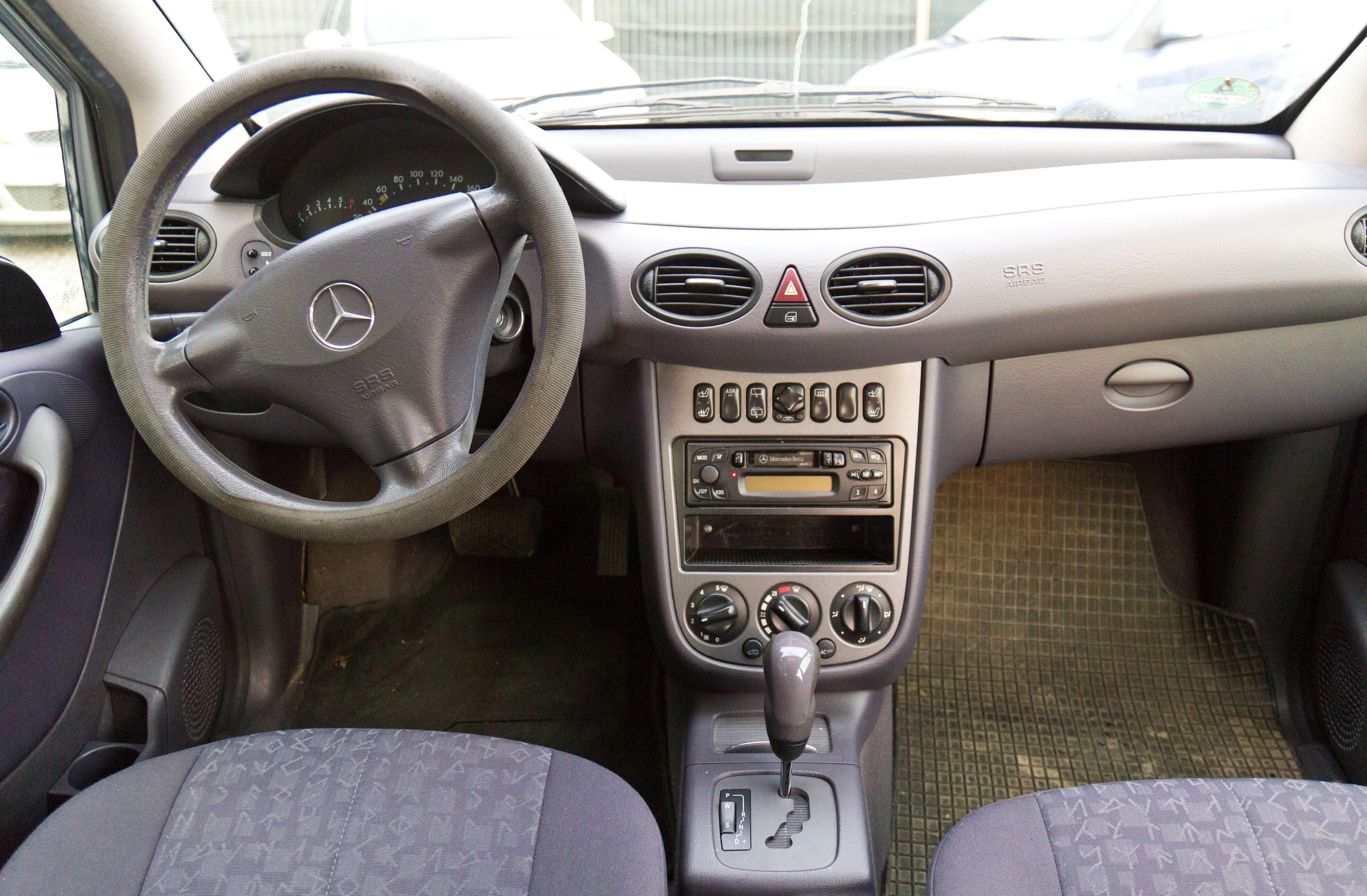 Mercedes-Benz W168 Interieur